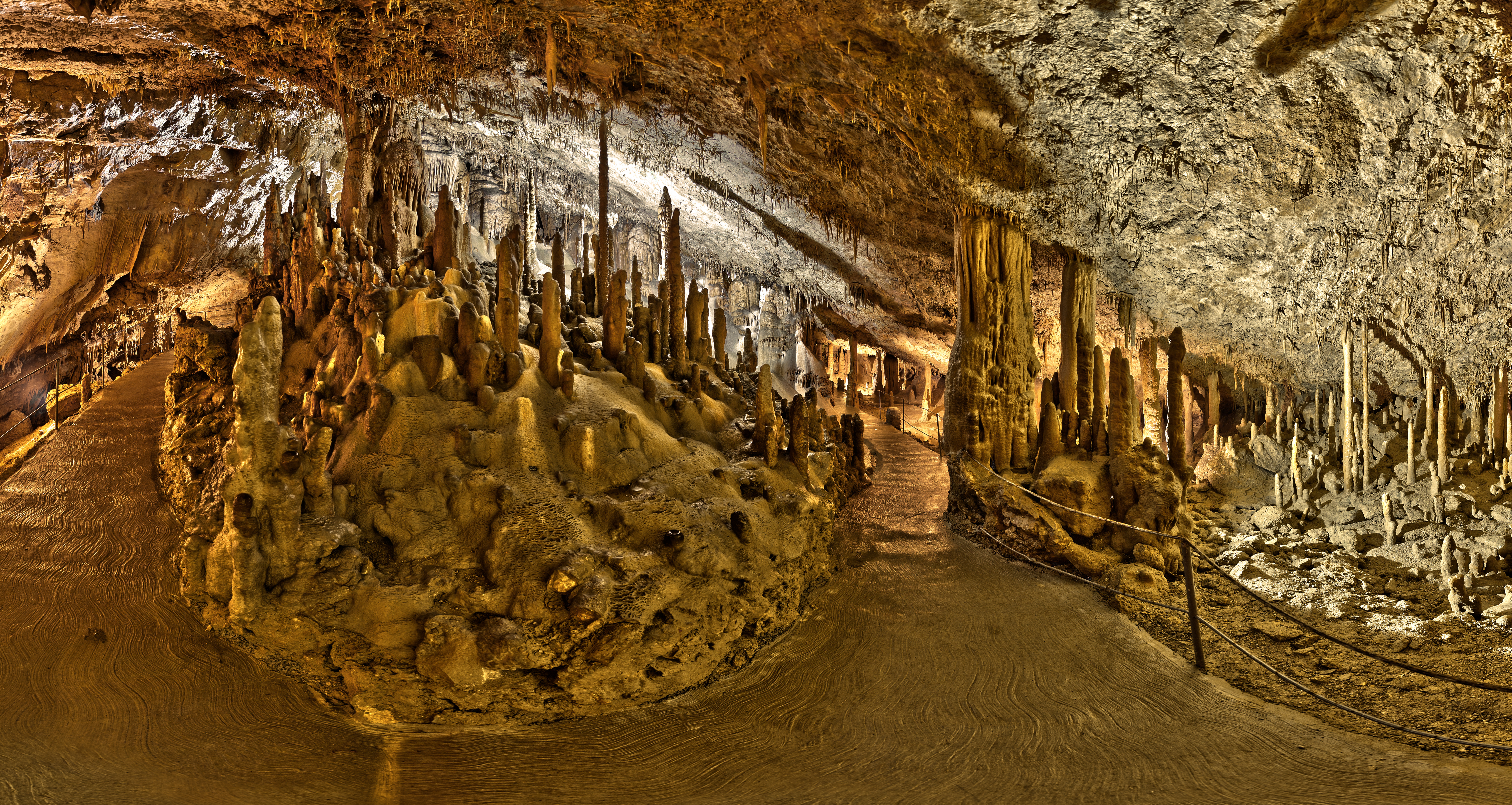 Turistična pot skozi Škocjanske jame. Fotografirano aprila 2013. Dovoljenje za fotografiranje ARSO in Regijski park Škocjanske jame.